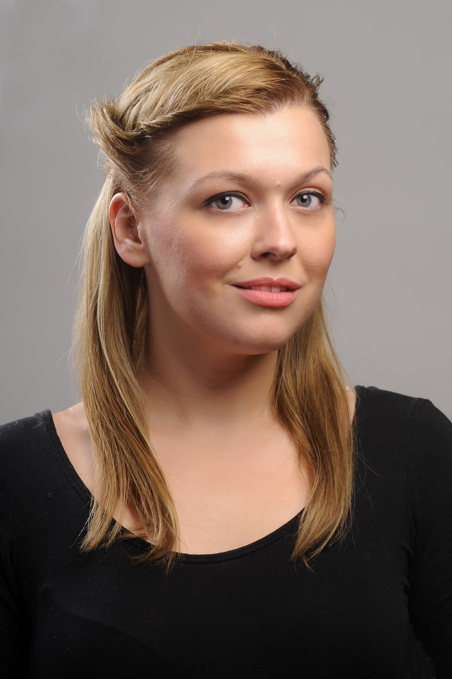 Edelényi Vivien (Dombóvár, 1987. január 16. –) magyar színésznő.